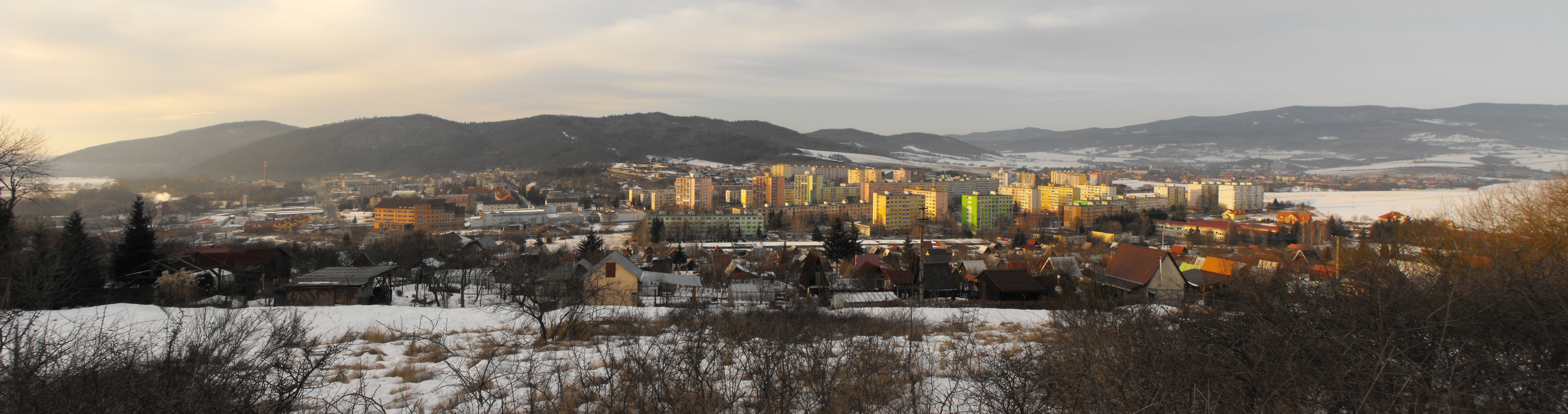 Pohľad na Detvu - sídlisko z ponad záhradkárskej osady v zime.